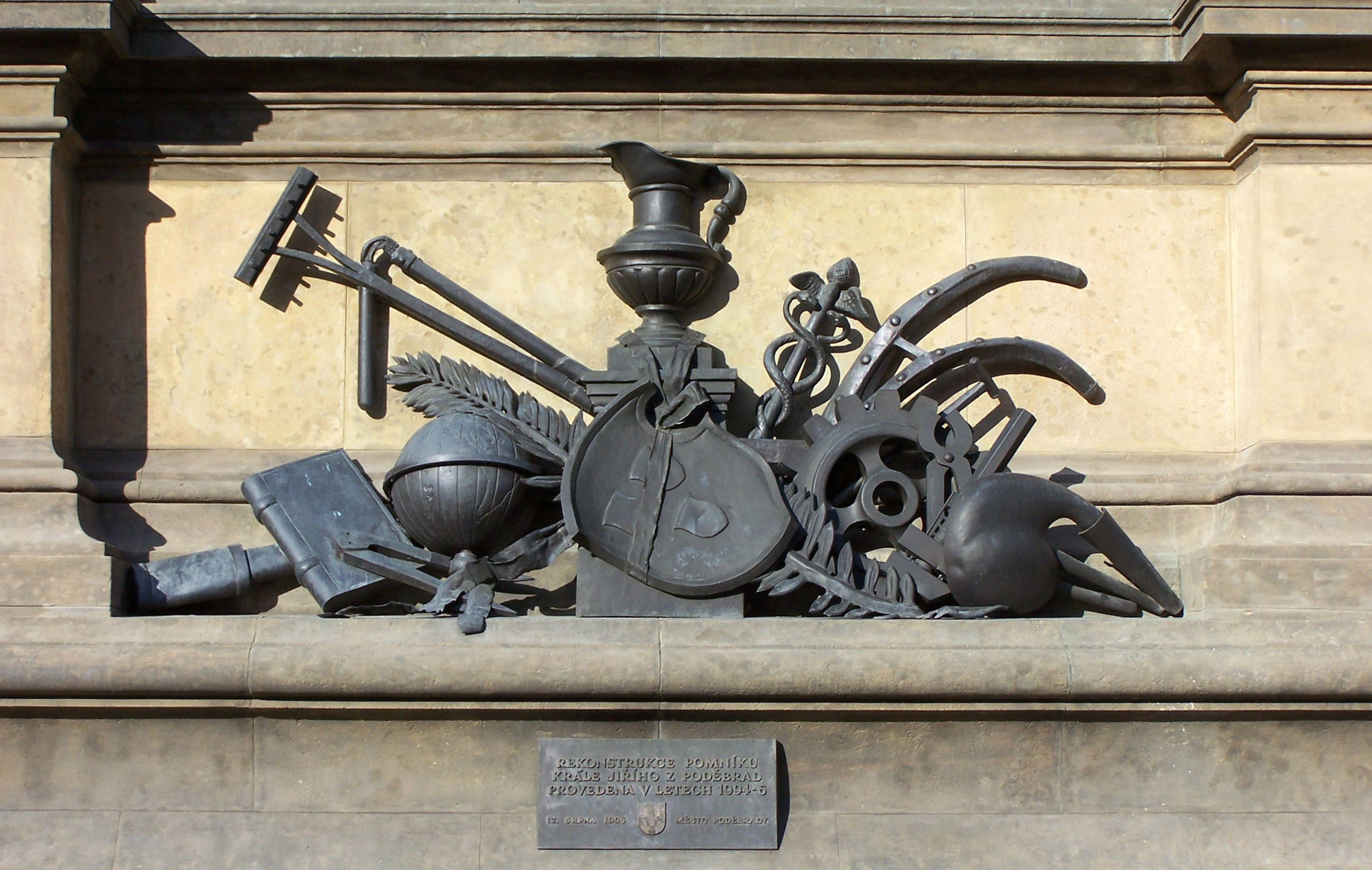 Pomník krále Jiřího od Bohuslava Schnircha, Poděbrady. Emblém míru na jižní straně pomníku.